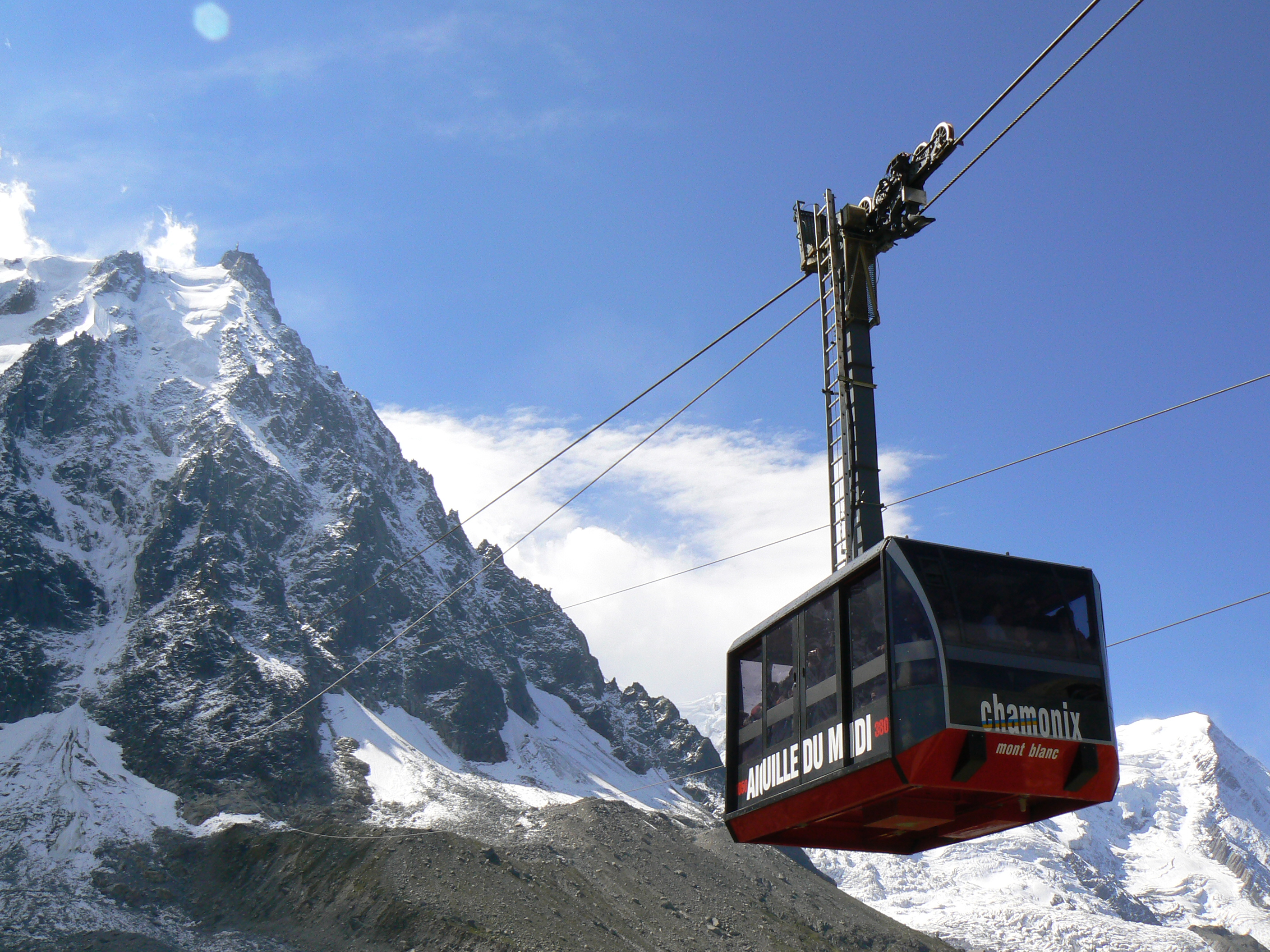 Photo de la benne du second tronçon - Date : 17 Août 2006 - Auteur : Clément RAOUX